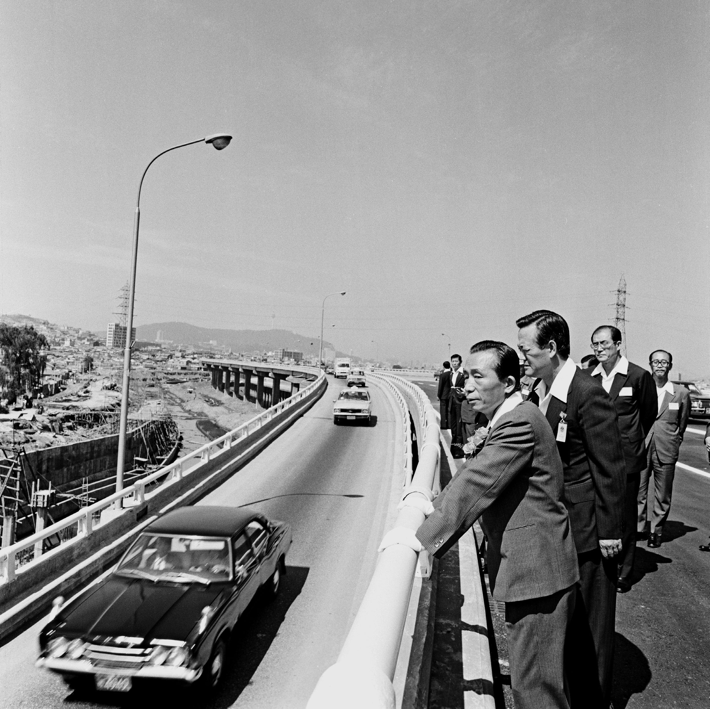 촬영일 : 1976년 07월 05일 촬영장소 : 대한민국 서울 천호대교 참석자 : 박정희 대통령 인물상세정보 : 박정희 대통령(우) 관련내용 : 박정희 대통령 천호대교 준공식 참석